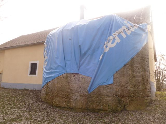 Schloss Neydharting-Nordseite_mit_abgedecktem_Turm